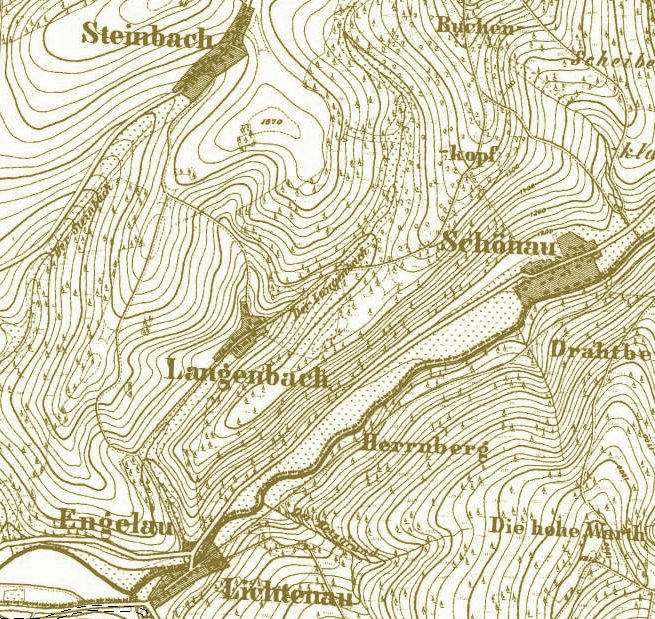 Ausschnitt des Ur-Messtischblattes mit den Ortsteilen im Bibergrund.